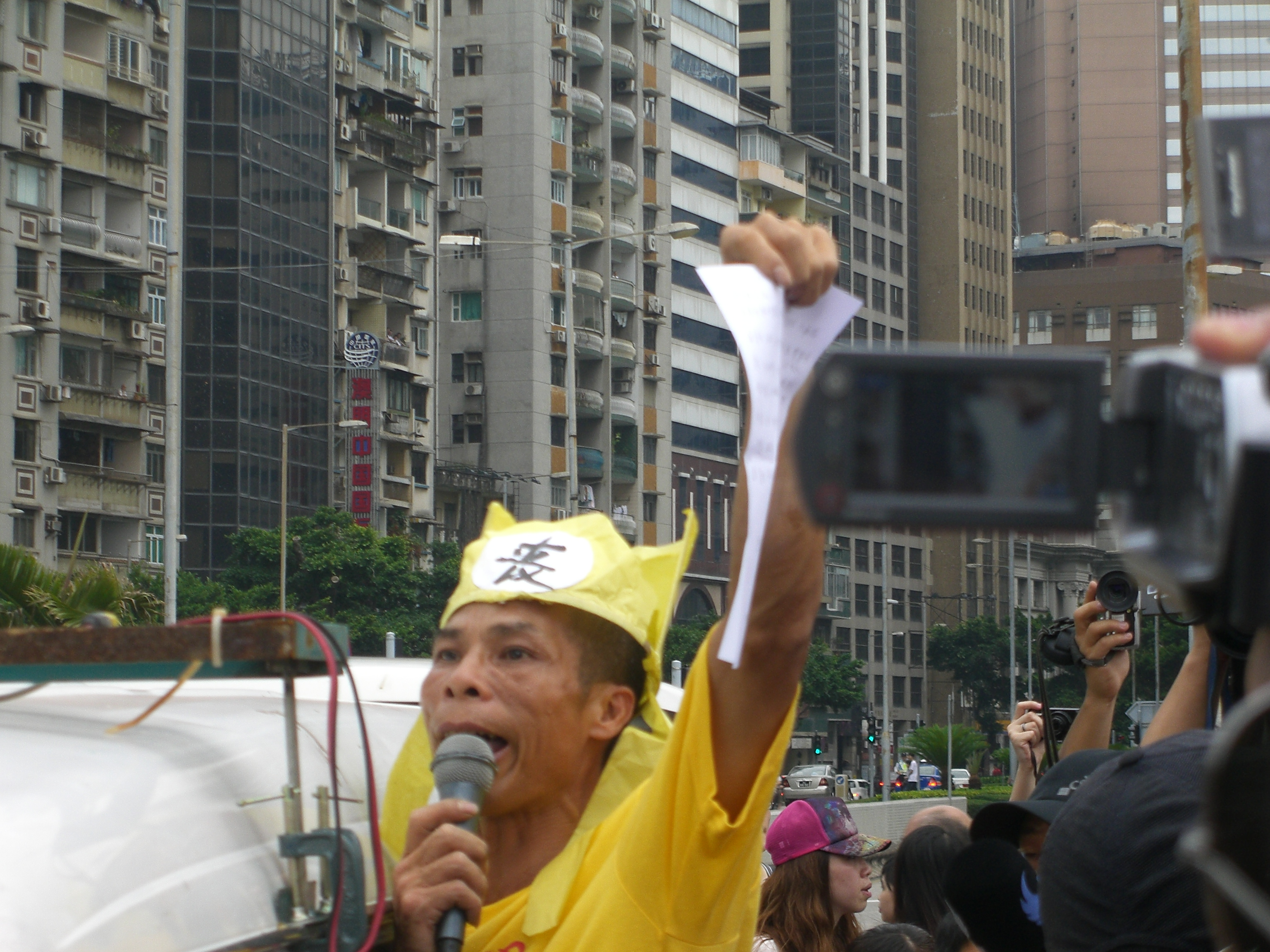 2011年澳門勞動節遊行